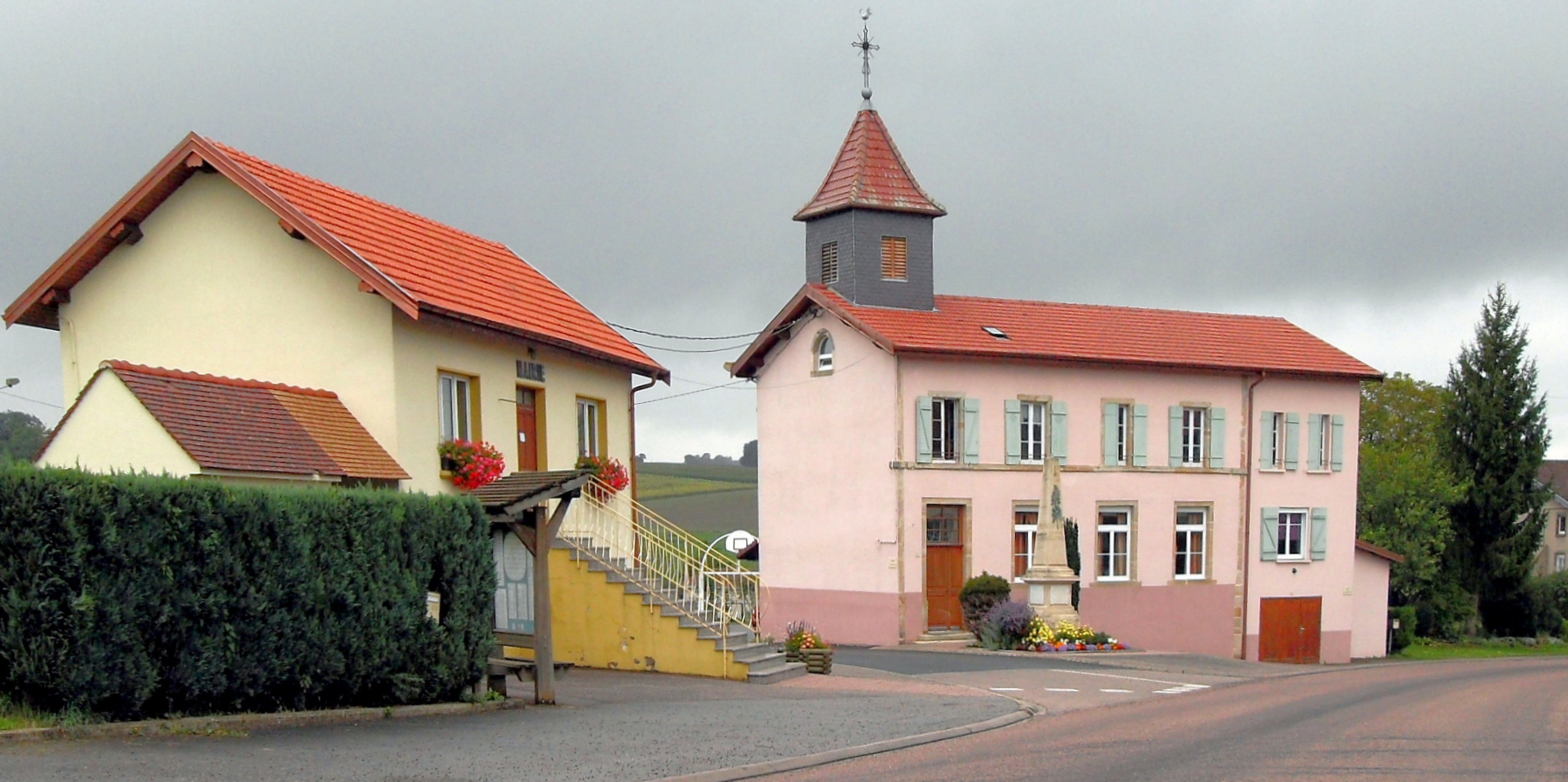 La mairie et l'ancienne école (actuelle salle des fêtes) de Pont-lès-Bonfays